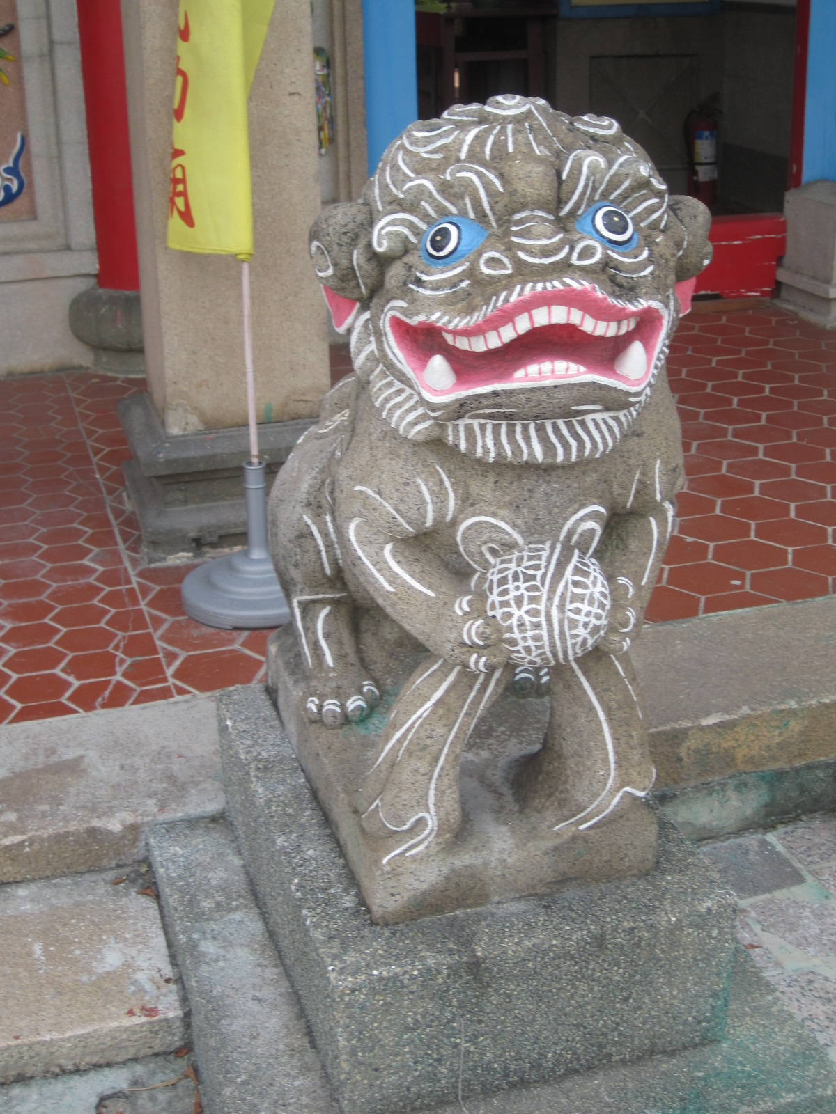 彰化鄭成功廟石獅，似原為彰化神社的狛犬